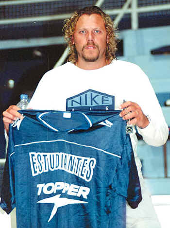 Hernán Montenegro, basquetbolista argentino retirado.